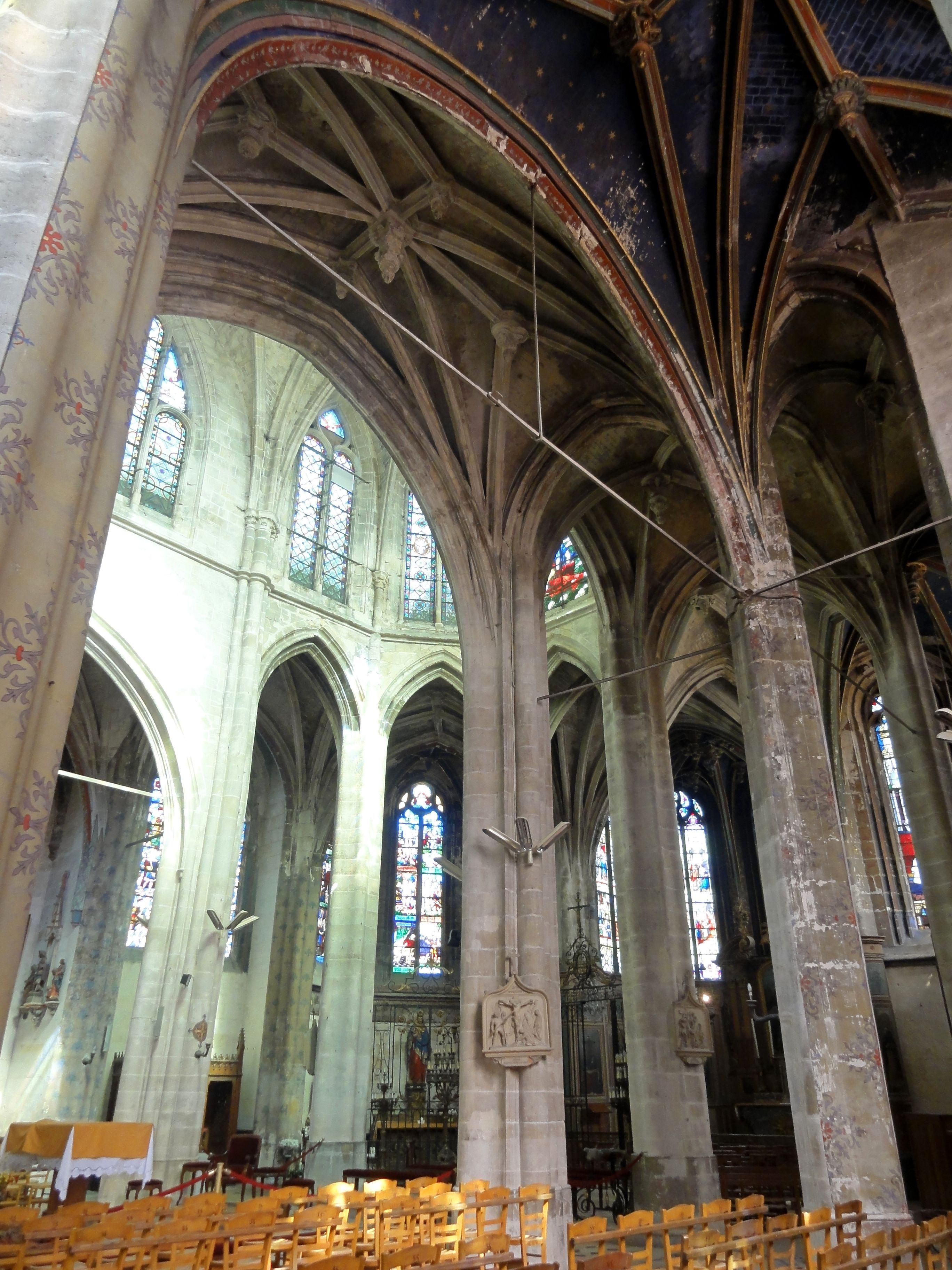 Chapelle St-Éloi, vue vers le nord.